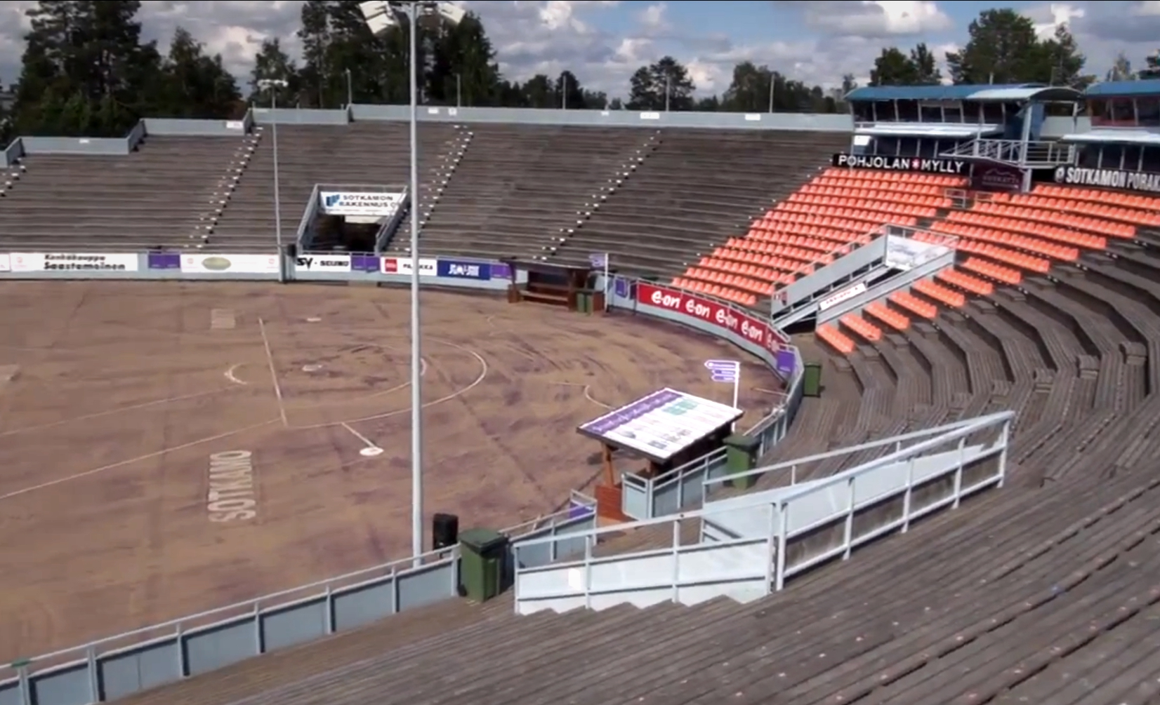 Hiukan Pesäpallostadion Sotkamossa